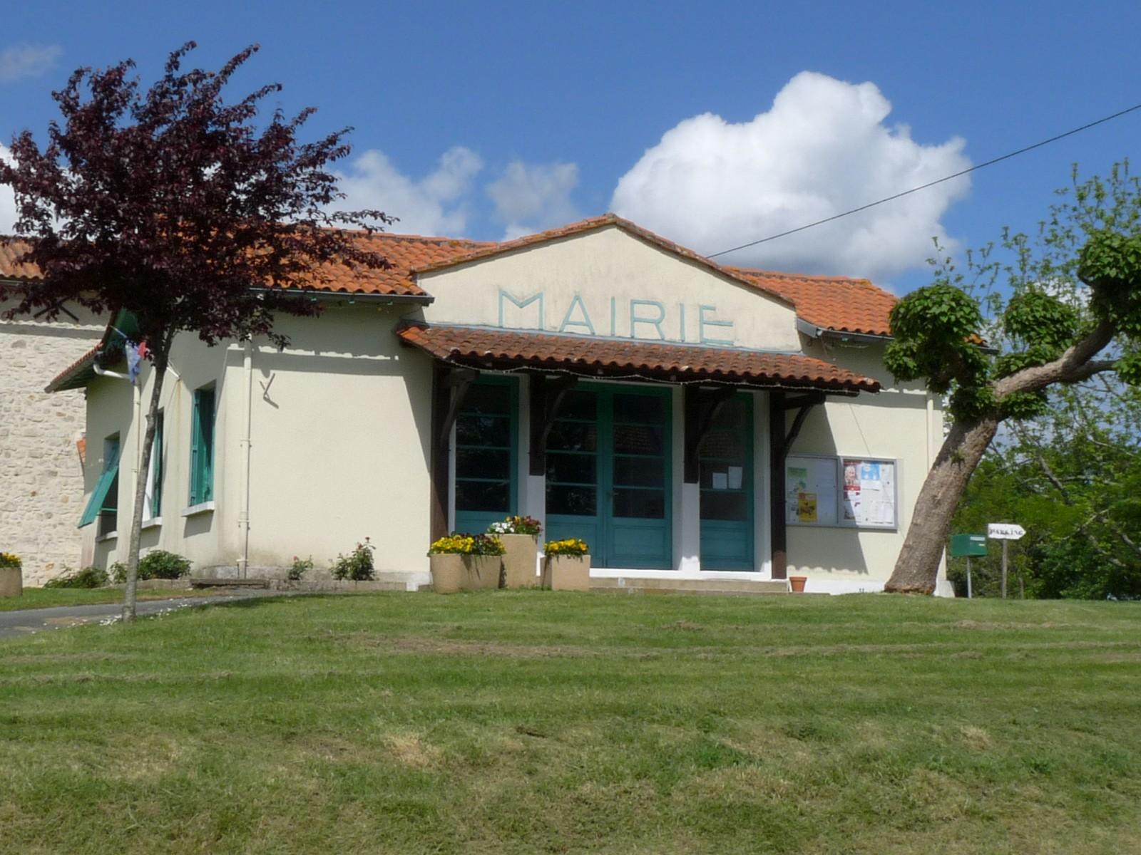 Mairie de Servanches, Dordogne, France